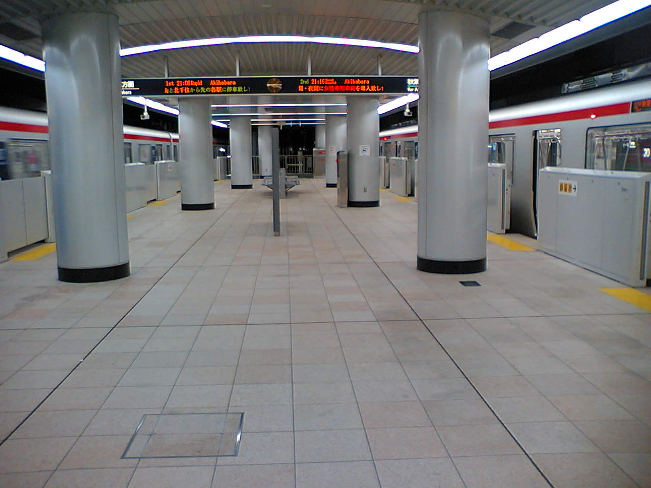 Inside at Tsukuba station , Tsukuba, Ibaraki prefecture, Japan.